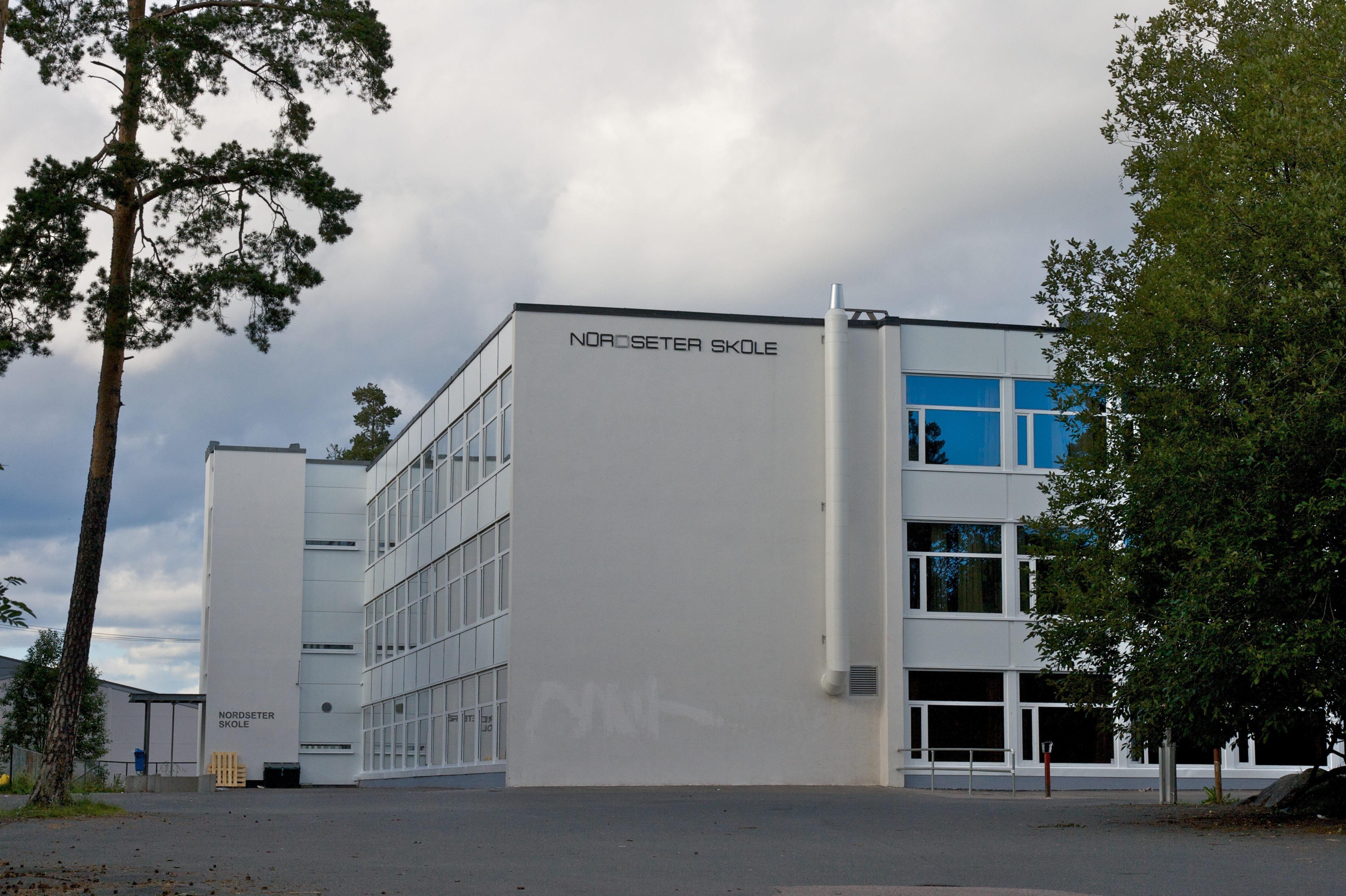 Nordseter skole.